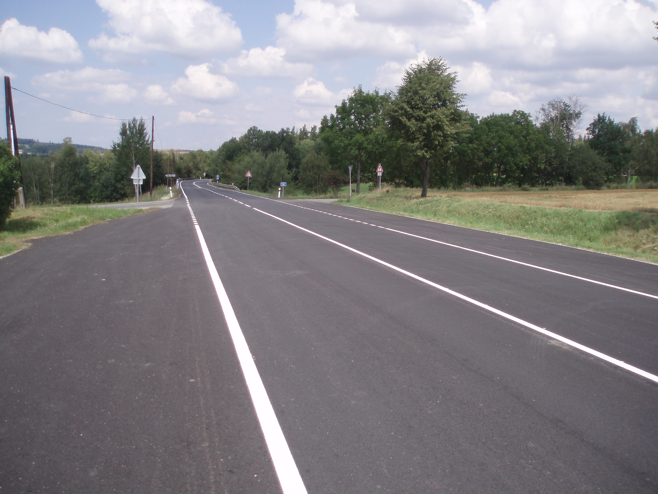 II/112 u Čakovic